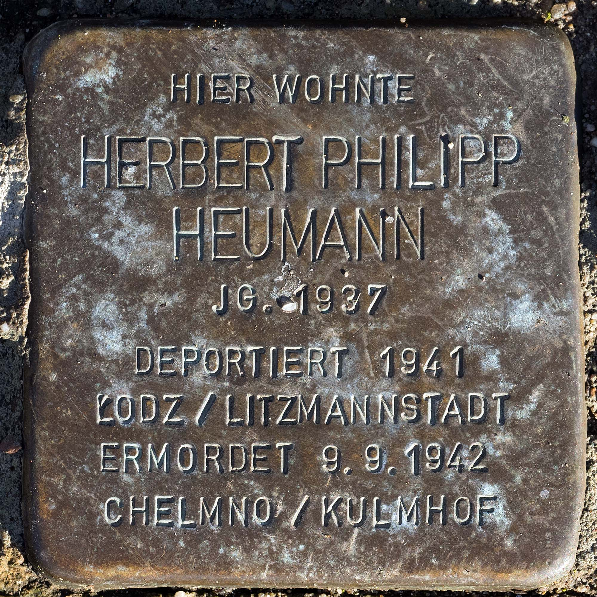 Stolperstein für Heumann Herbert Philipp